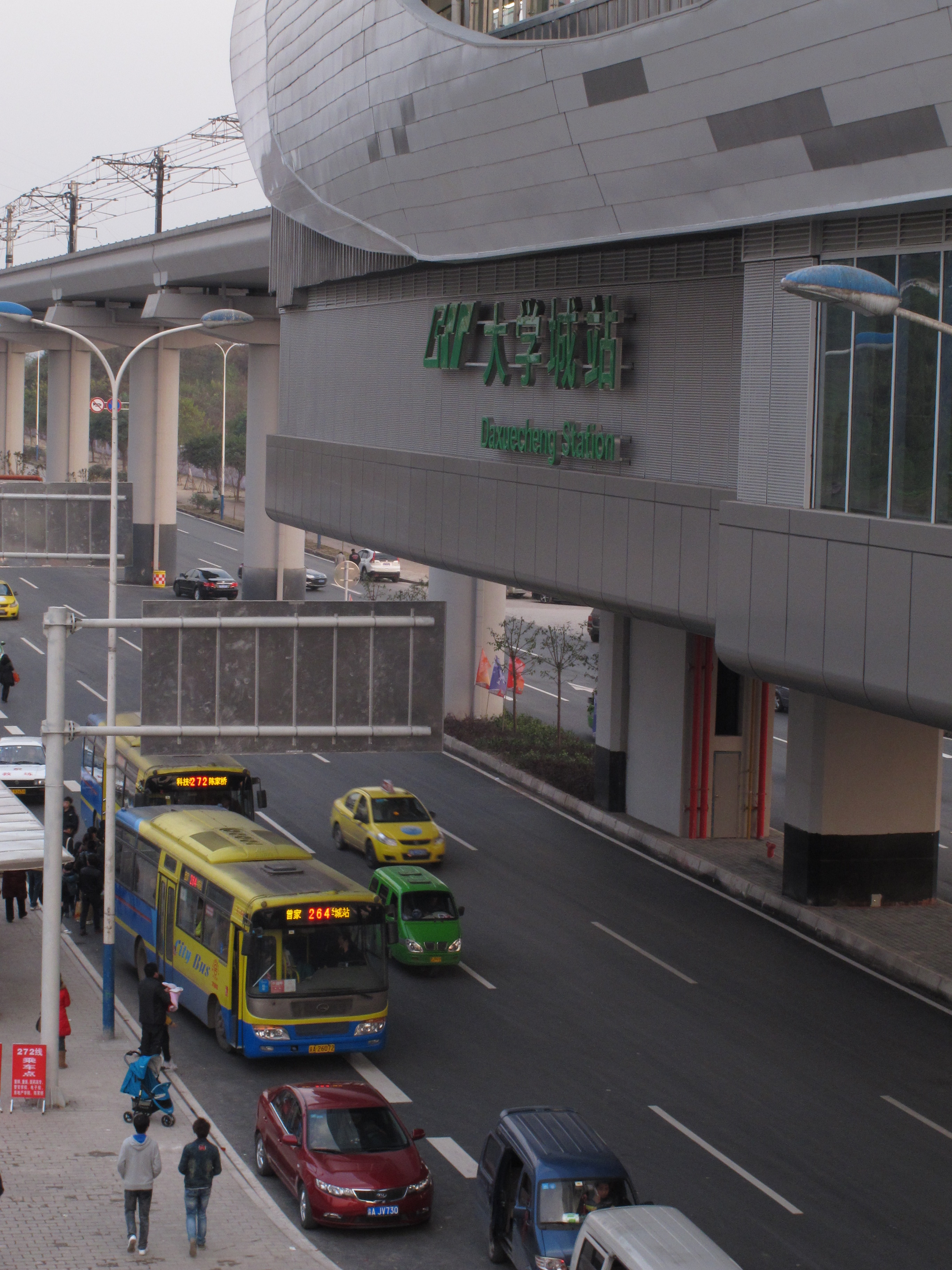 重庆轨道交通1号线 大学城站是一个高架车站